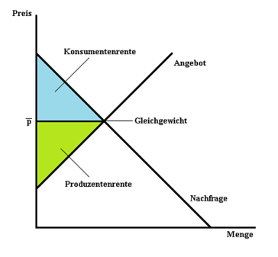 Schaubild mit Angebots- und Nachfragekurve, sowie Konsumentenrente, Produzentenrente und dem Gleichgewicht.